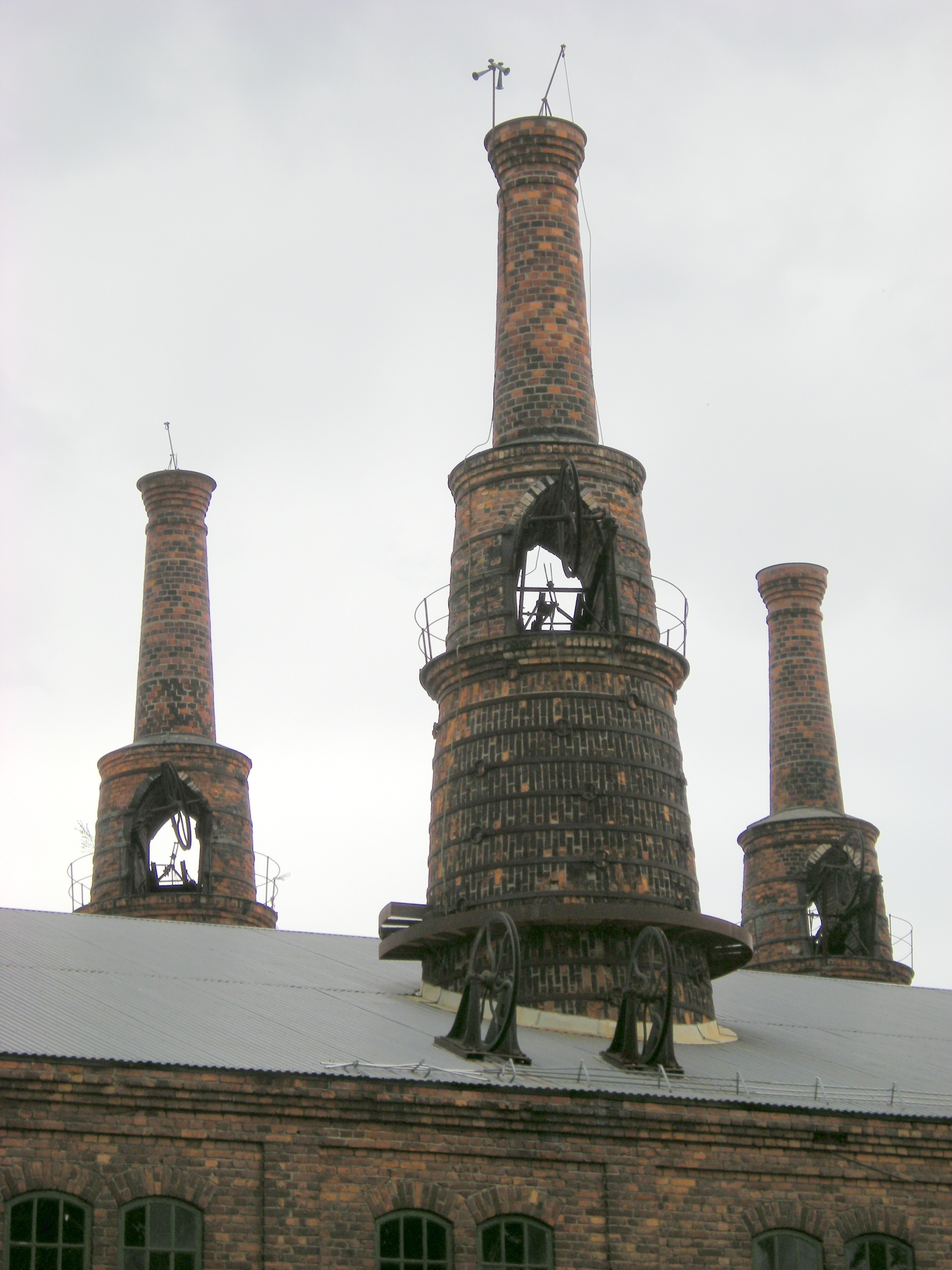 Masugnar vid Forsbacka bruk